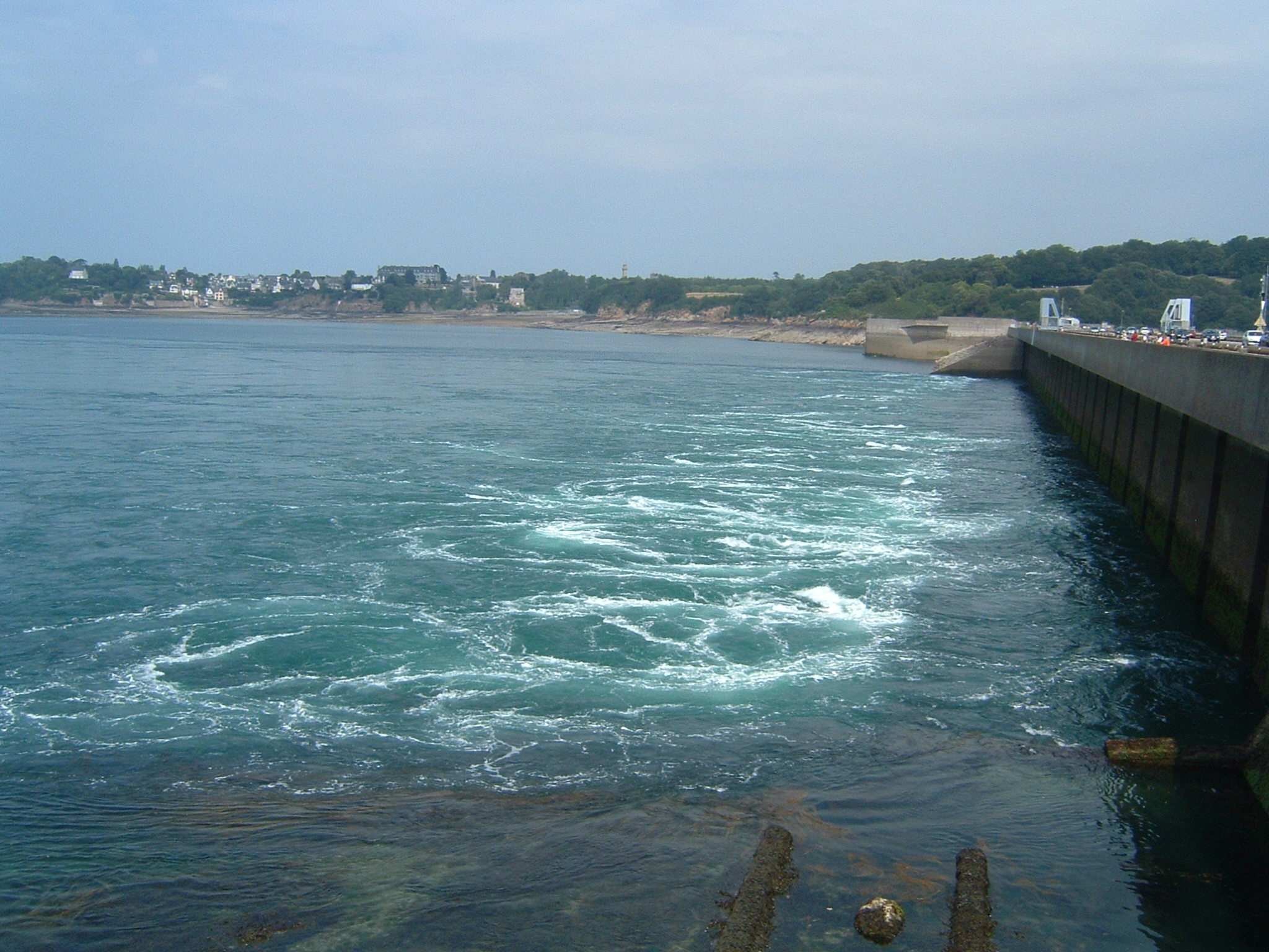 Barrage de la Rance Usine marémotrice France.